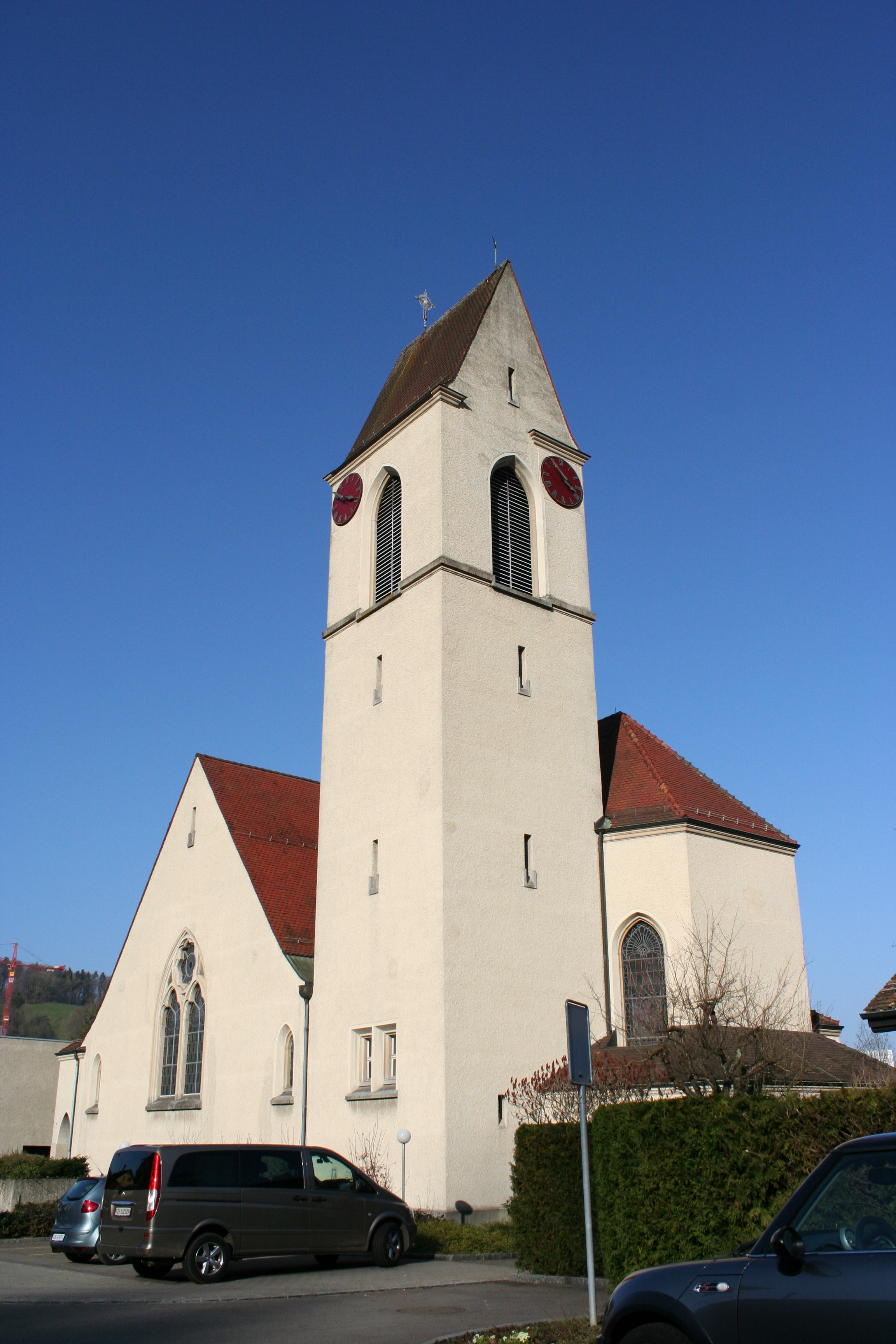 Römisch-katholische Pfarrkirche St. Josef Winterthur-Töss, Ansicht von Südosten